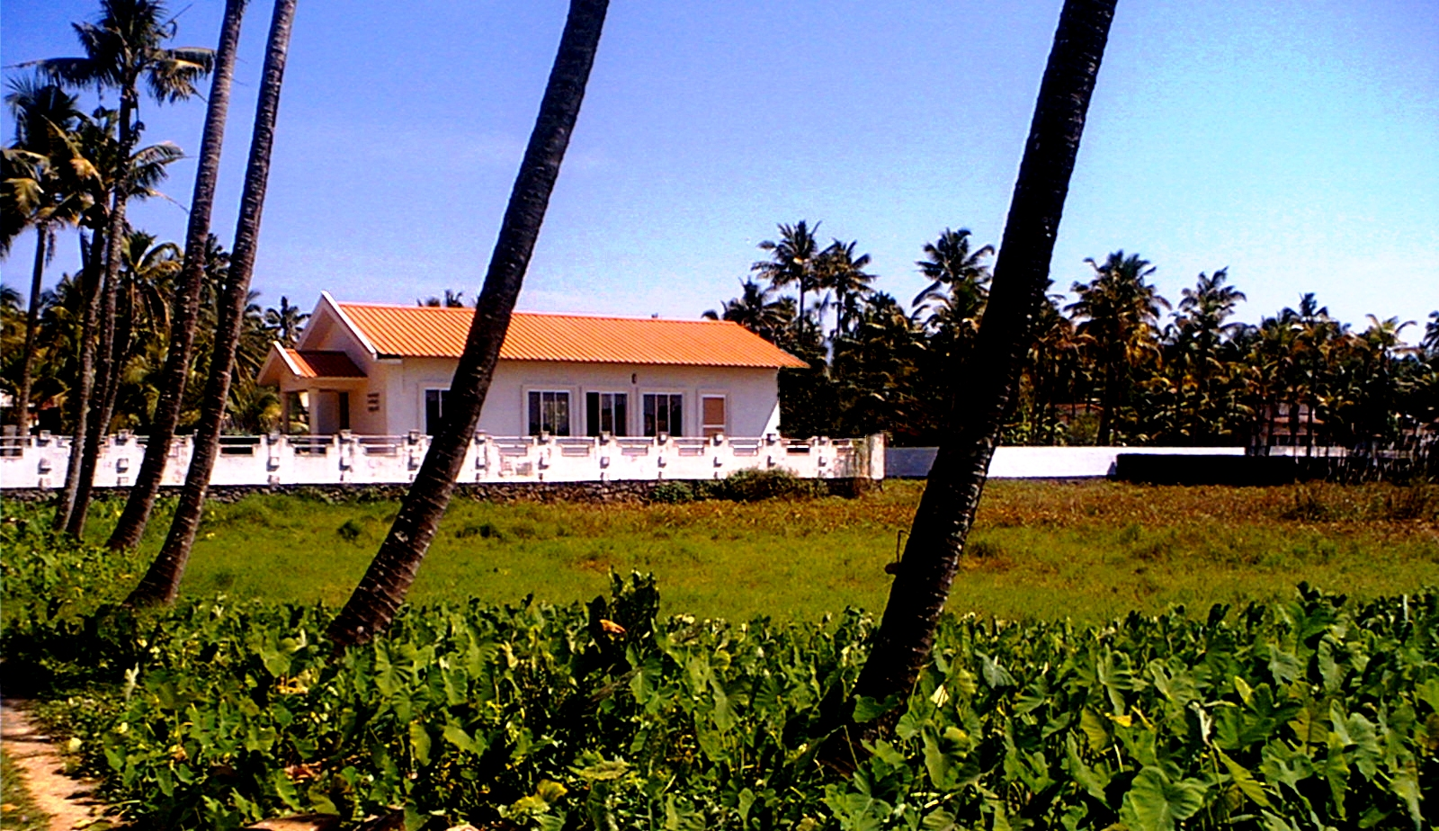 Kingdom Hall